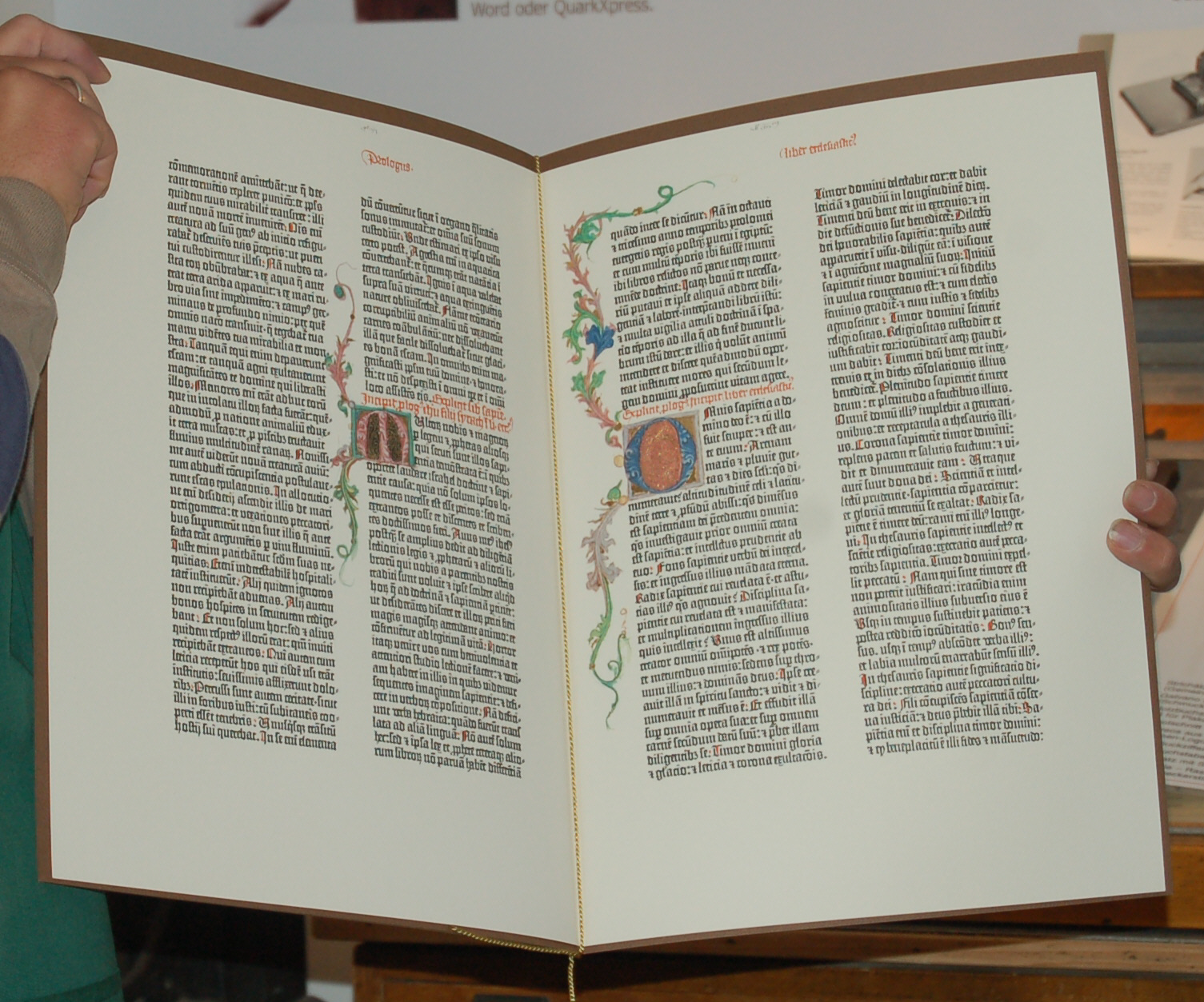 Repro von zwei Seiten der Gutenberg-Bibel, fotografiert im Stadt und Heimatgeschichtlichen Museum Uetersen